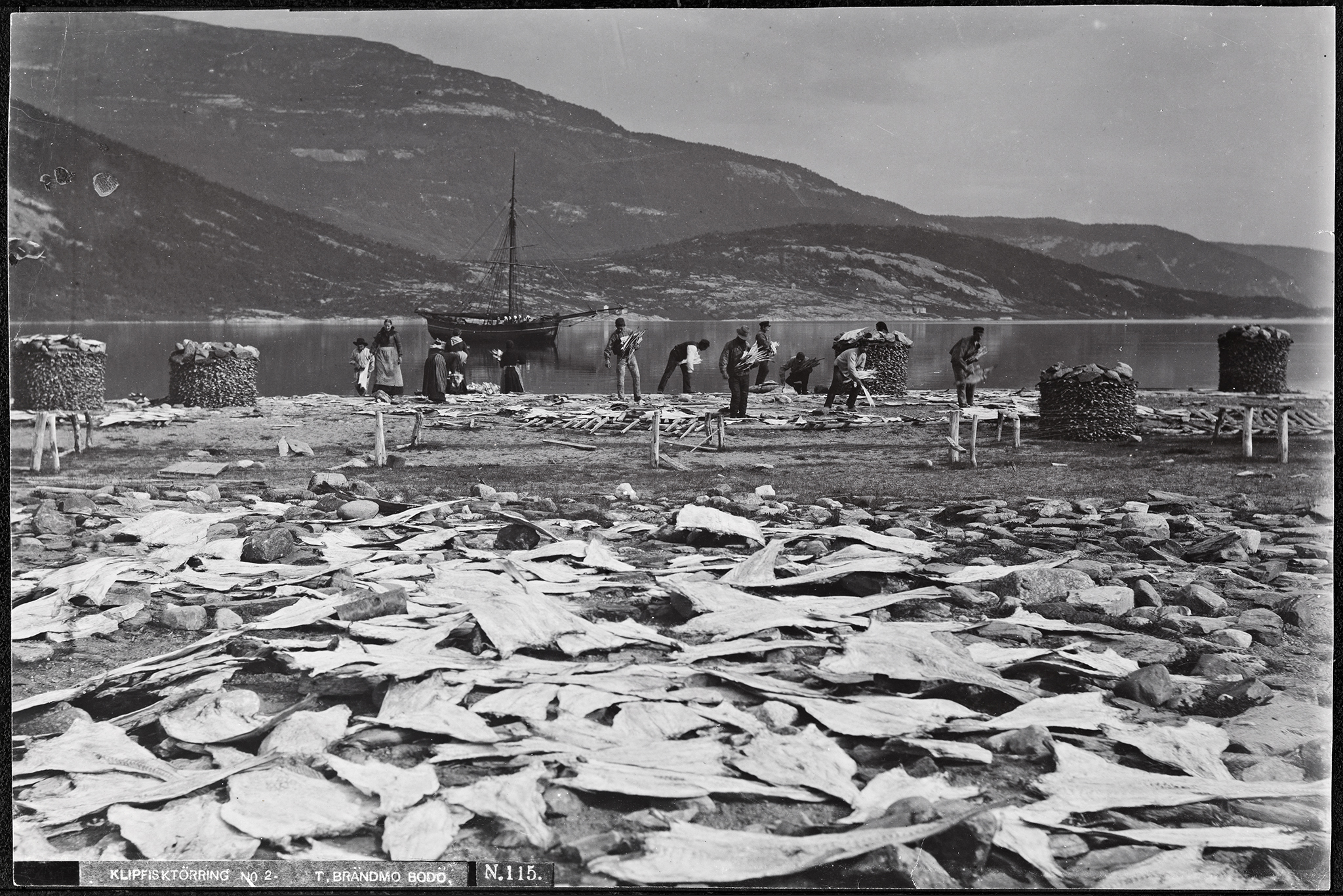 Tittel / Title: N. 115 Klipfisktörring No 2 Beskrivelse / Description: Tørking av klippfisk / drying of klippfisk (split, salted and dried cod). Dato / Date: ukjent / unknown Fotograf / Photographer: T. Brændmo (Bodø) Sted / Place: Nordland Eier / Owner Institution: Nasjonalbiblioteket / National Library of Norway Lenke / Link: Bildesignatur / Image Number: bldsa_FA1197